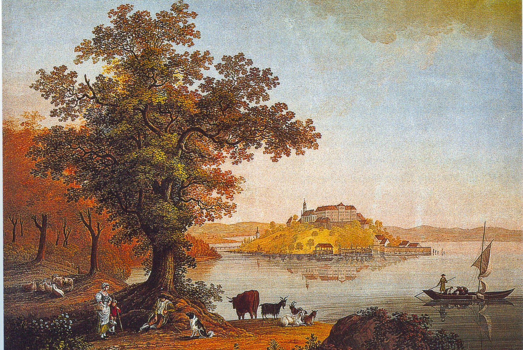 Insel Mainau Schloss der Großherzöge von Baden